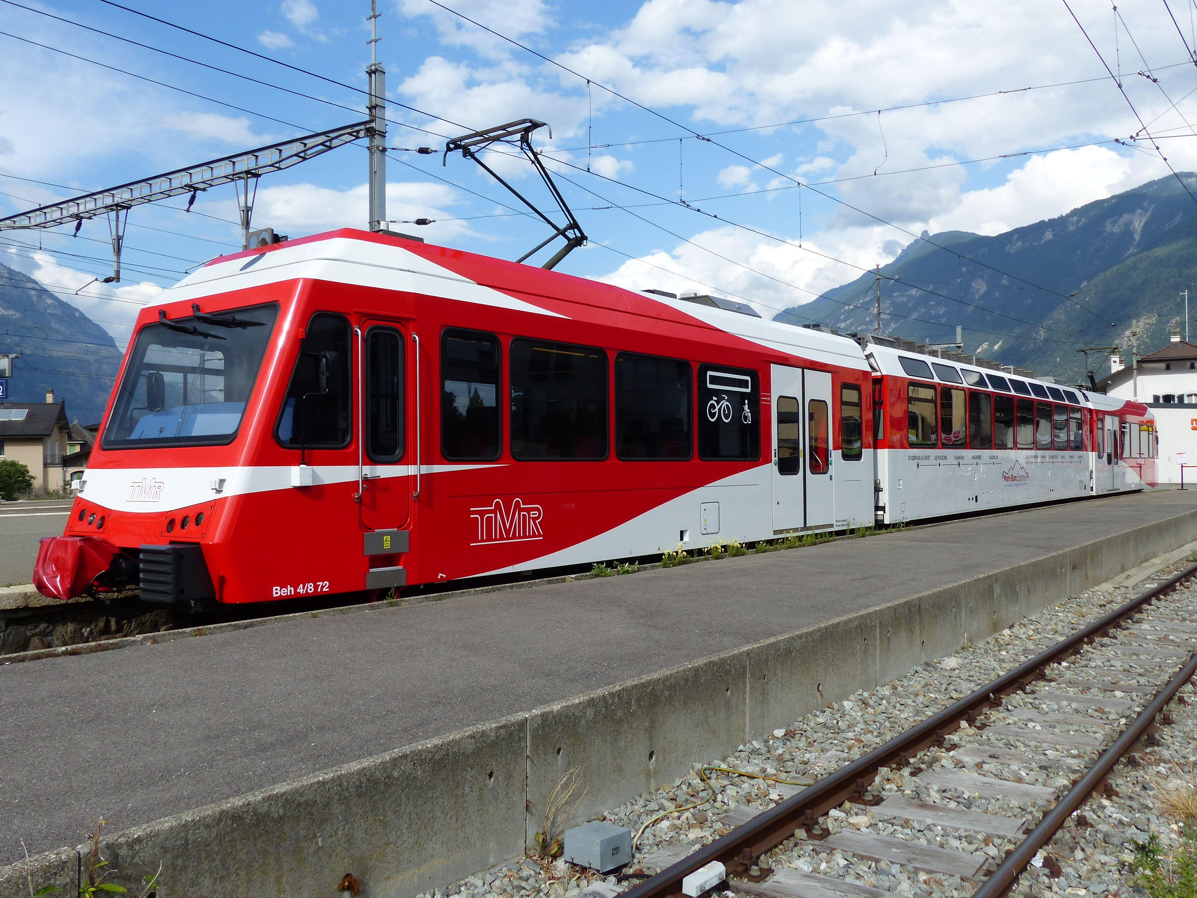 Bahnhof von Martigny: Zug der Martigny-Châtelard-Linie